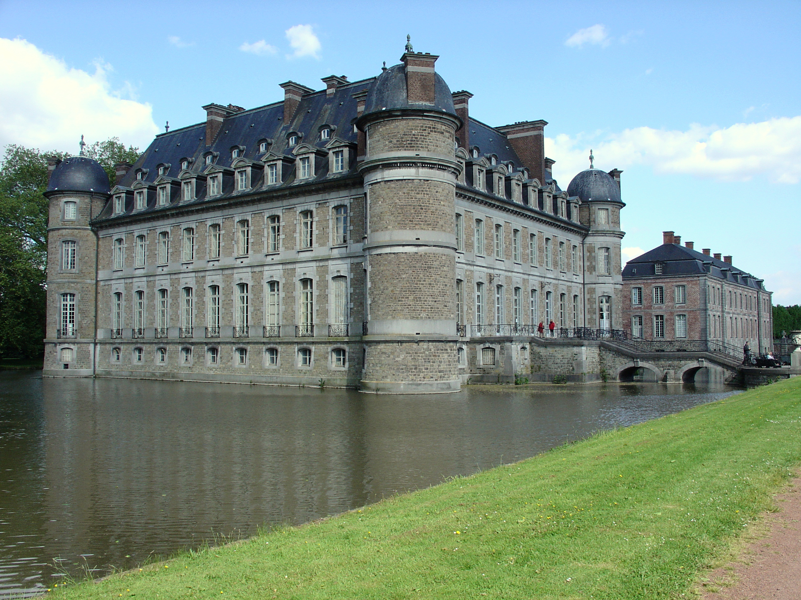 Kasteel van Beloeil